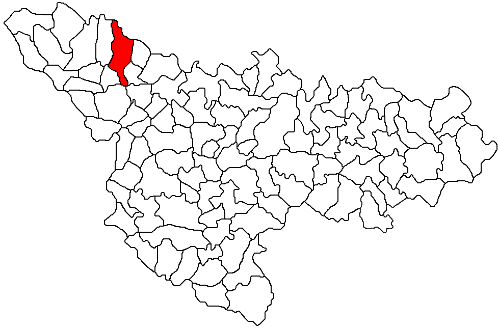 Sanpetru Mare, Timis Licensing Categorie:Hărţi ale judeţului Timiş